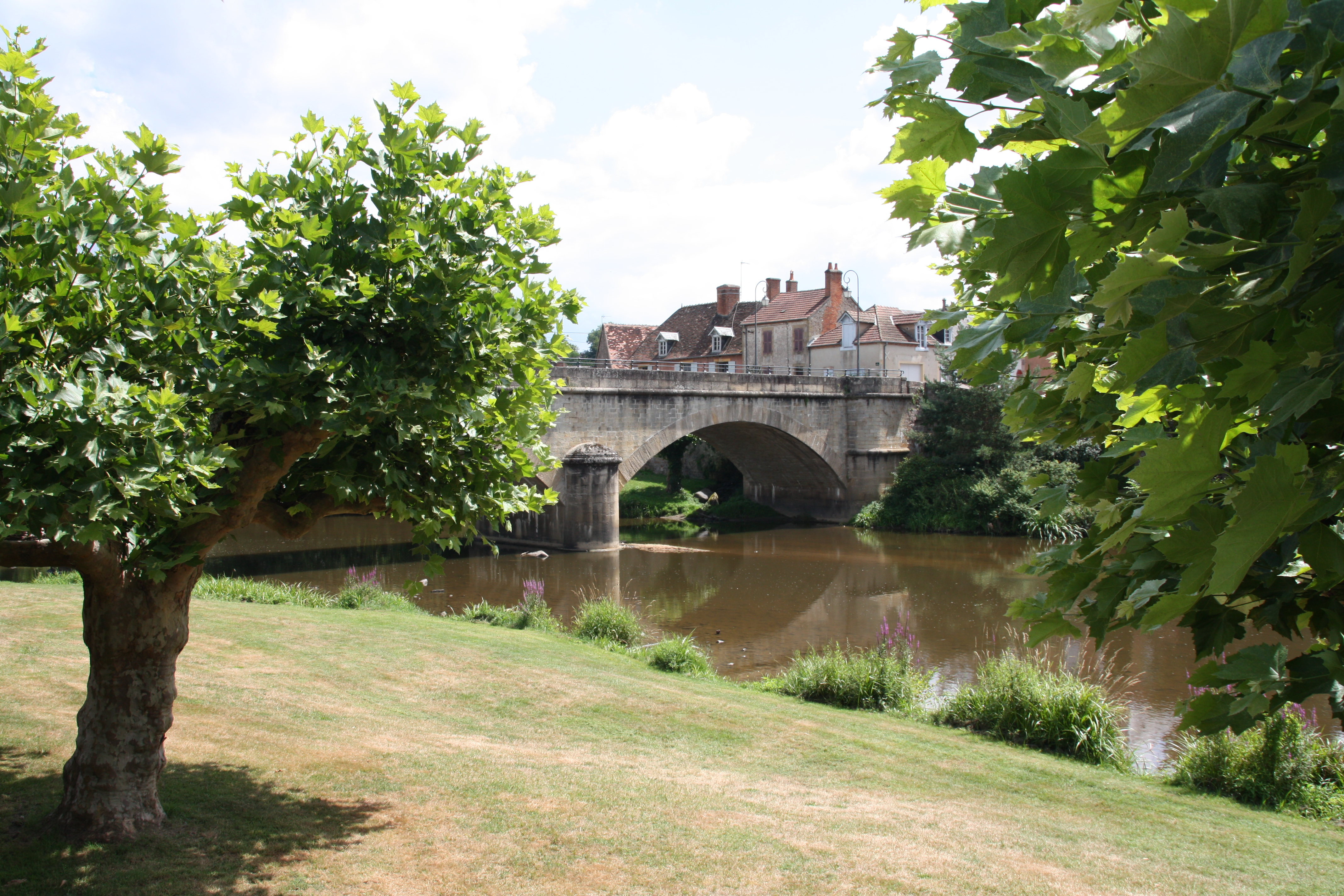 l'Aumance à Hérisson, France